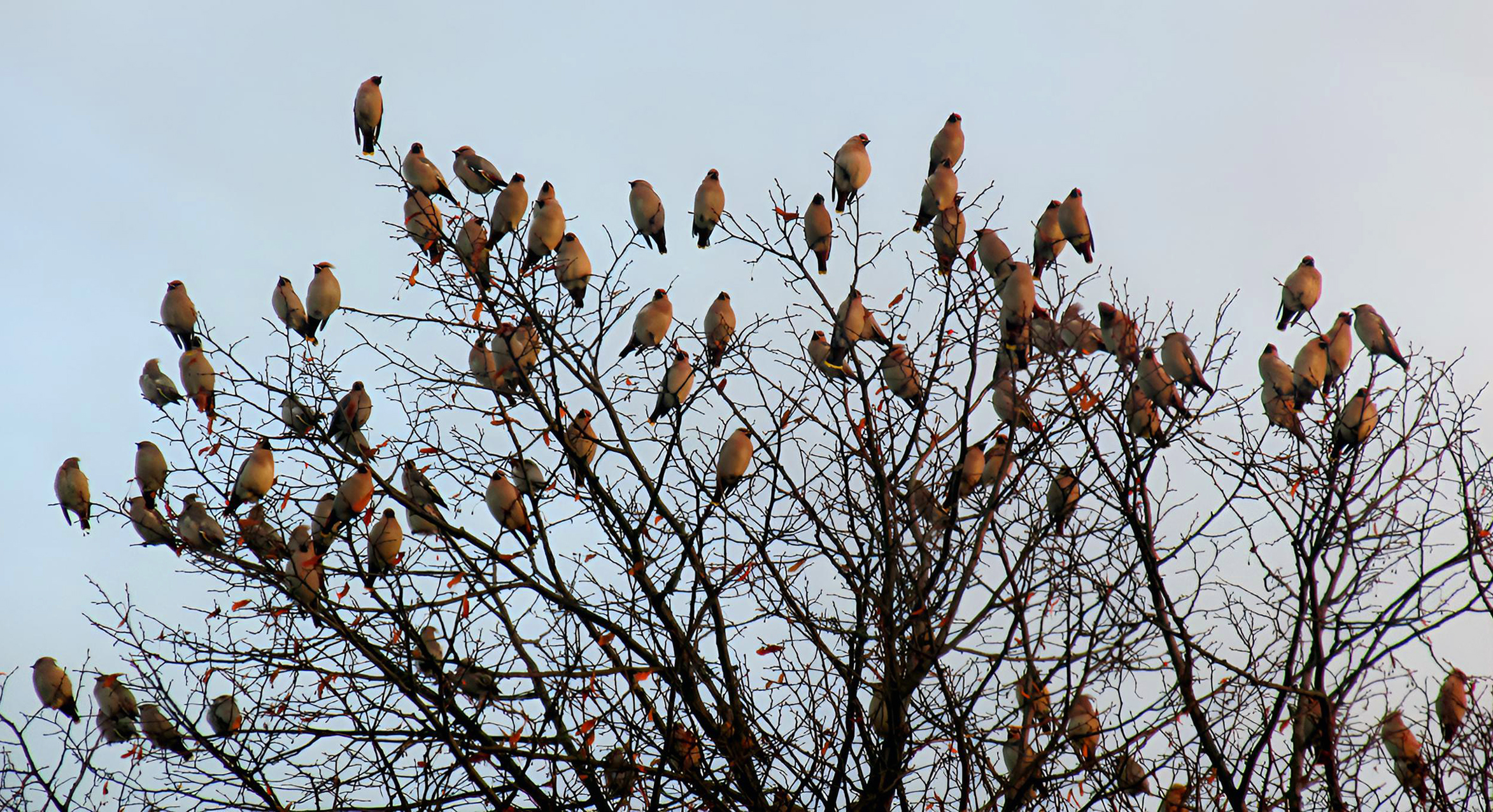 Sidensvansen är en flockfågel, och ses ofta i hundratals i toppen på höga träd.